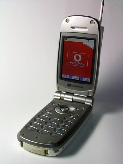 Mobile_phone_V601N_Vodafone Japan